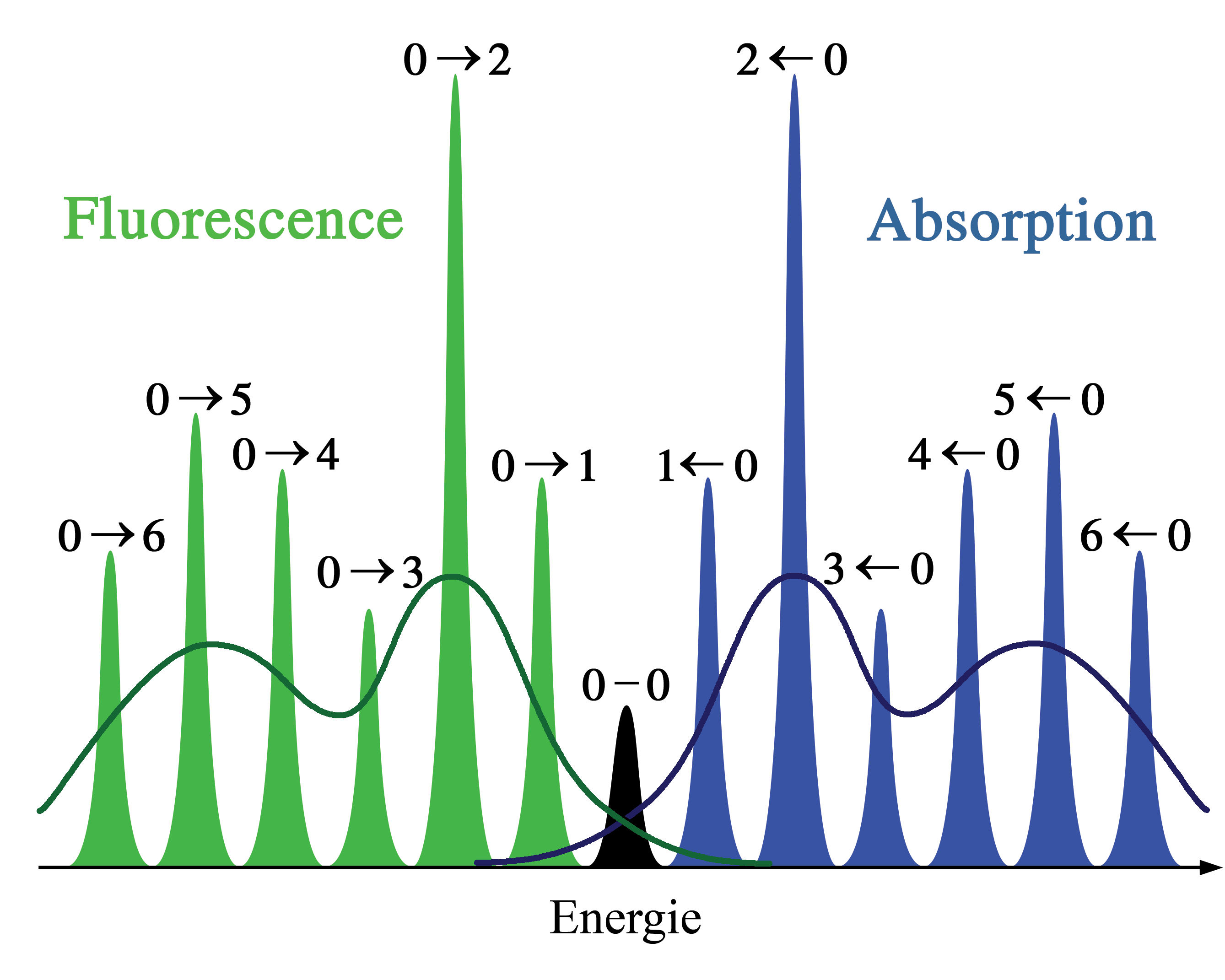 Deptiction of absorption and fluorescence progression due to changes in vibrational levels during electronic transition. Now in french. Description des modifications d'absorption et de fluorescence dues aux modifications dans les niveaux vibratoires durant une transition électronique.